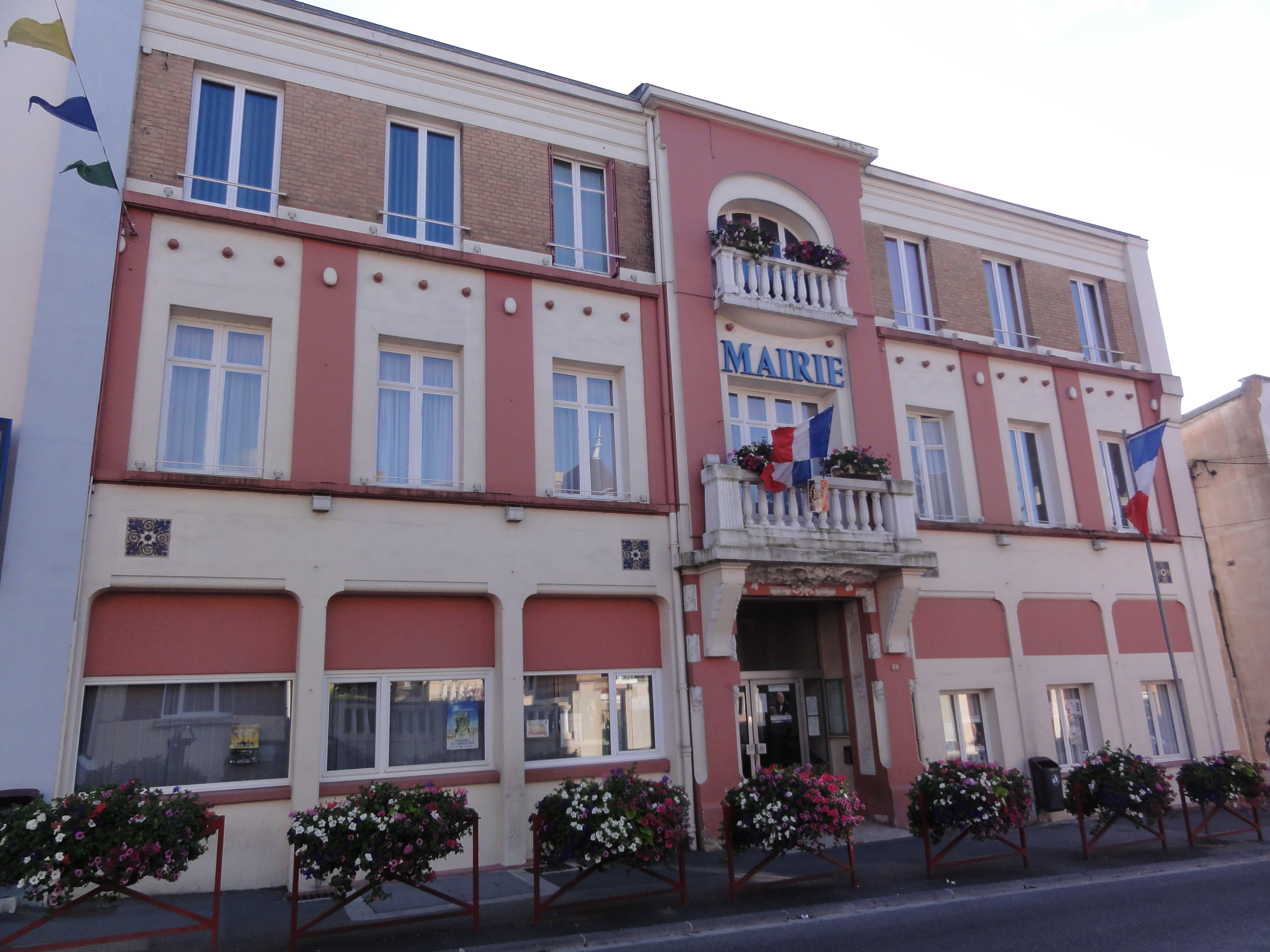 Hirson (Aisne), mairie